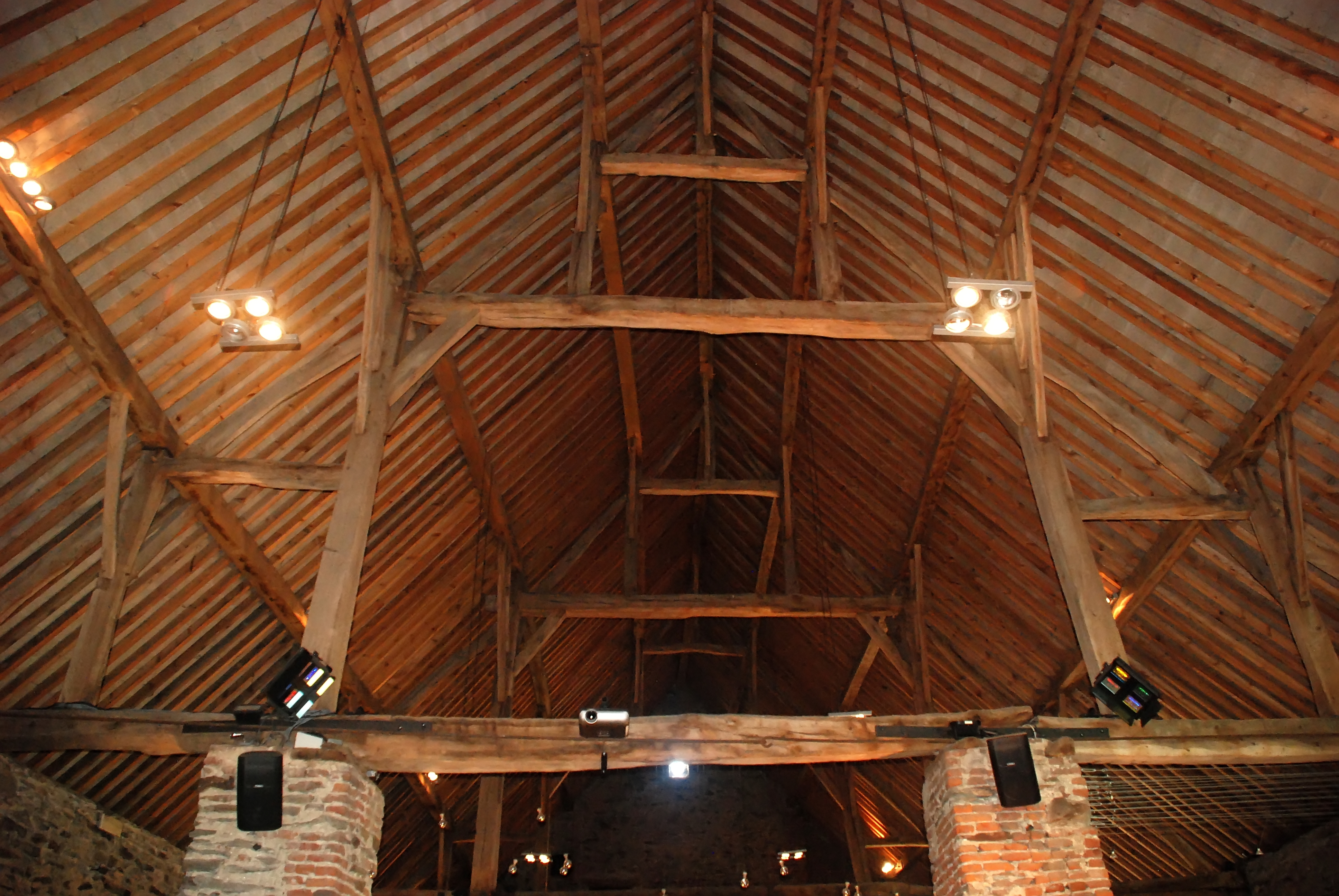 Belgique - Brabant wallon - Court-Saint-Étienne - Ferme de Beaurieux - Charpente de la grange